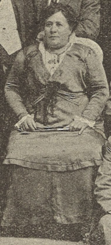 Eva Canel, en una fotografía publicada en su libro "Lo que vi en Cuba" (1916) en la que aparece fotografiada como socia de honor con los miembros de la Asociación de Naturales del Concejo de El Franco